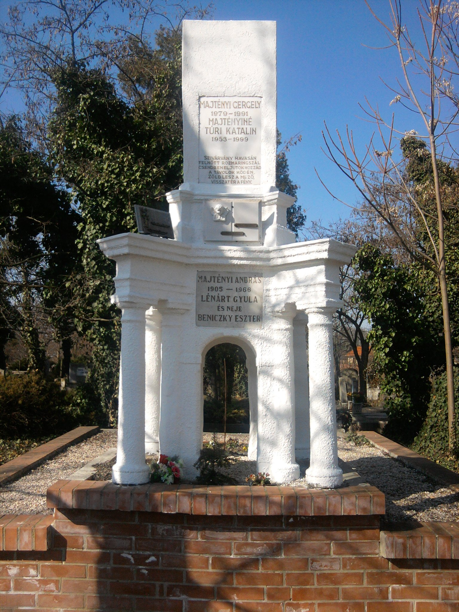 A Majtényi-család síremléke, Alsó református temető - Szentes, Temető utca